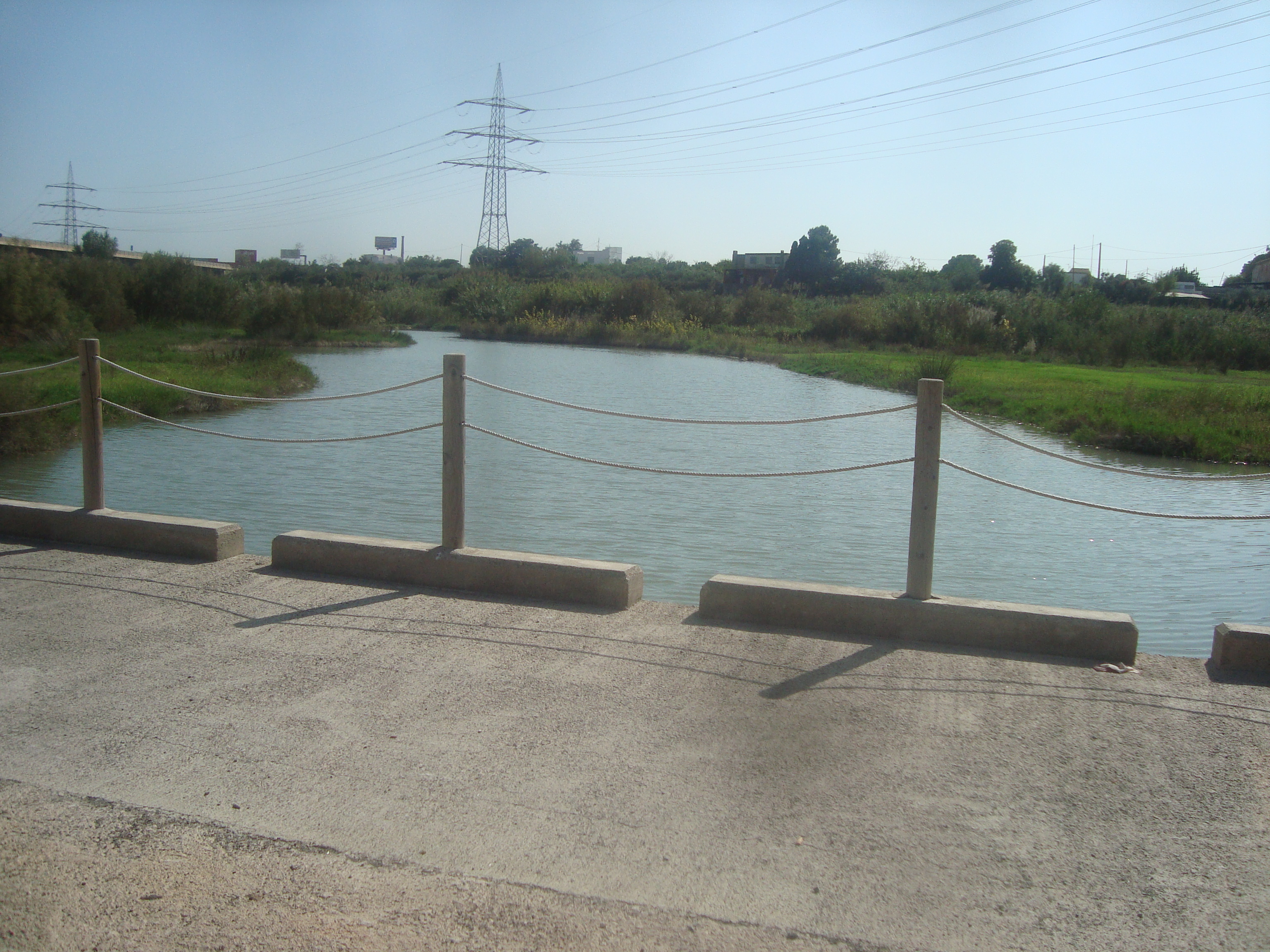 La Rambla de la Viuda es un río seco, por el que sólo circulan espas módicas avenidas, muy dependientes de la estructura espacio-temporal de las precipitaciones. La rambla de la Viuda recibe esta denominación tras la unión del río Monleón con la rambla Carbonera, en la confluencia de los términos municipales de Culla, Sierra Engarcerán, y Useras, en la provincia de Castellón y desembocando en el río Mijares a la altura del término municipal de Almazora (a muy pocos quilómetros del mar Mediterráneo). La Rambla de la Viuda es un río seco, por el que sólo circulan módicas avenidas de la estructura espacio-temporal de las precipitaciones.